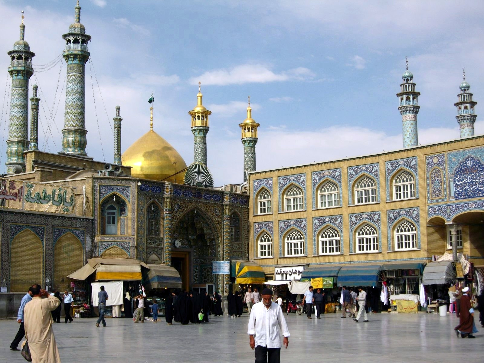 Hazrat-e Masumeh, Qom, Iran